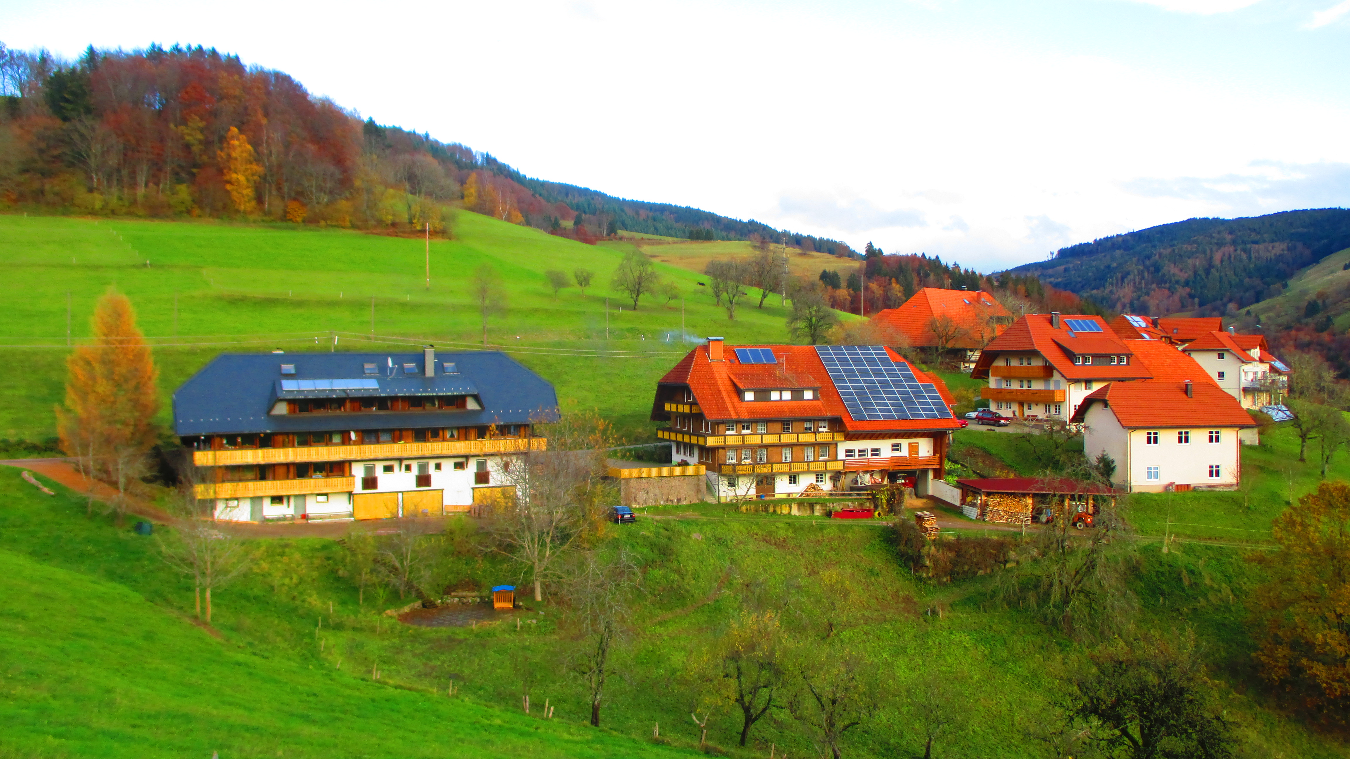 Häuser in Holz